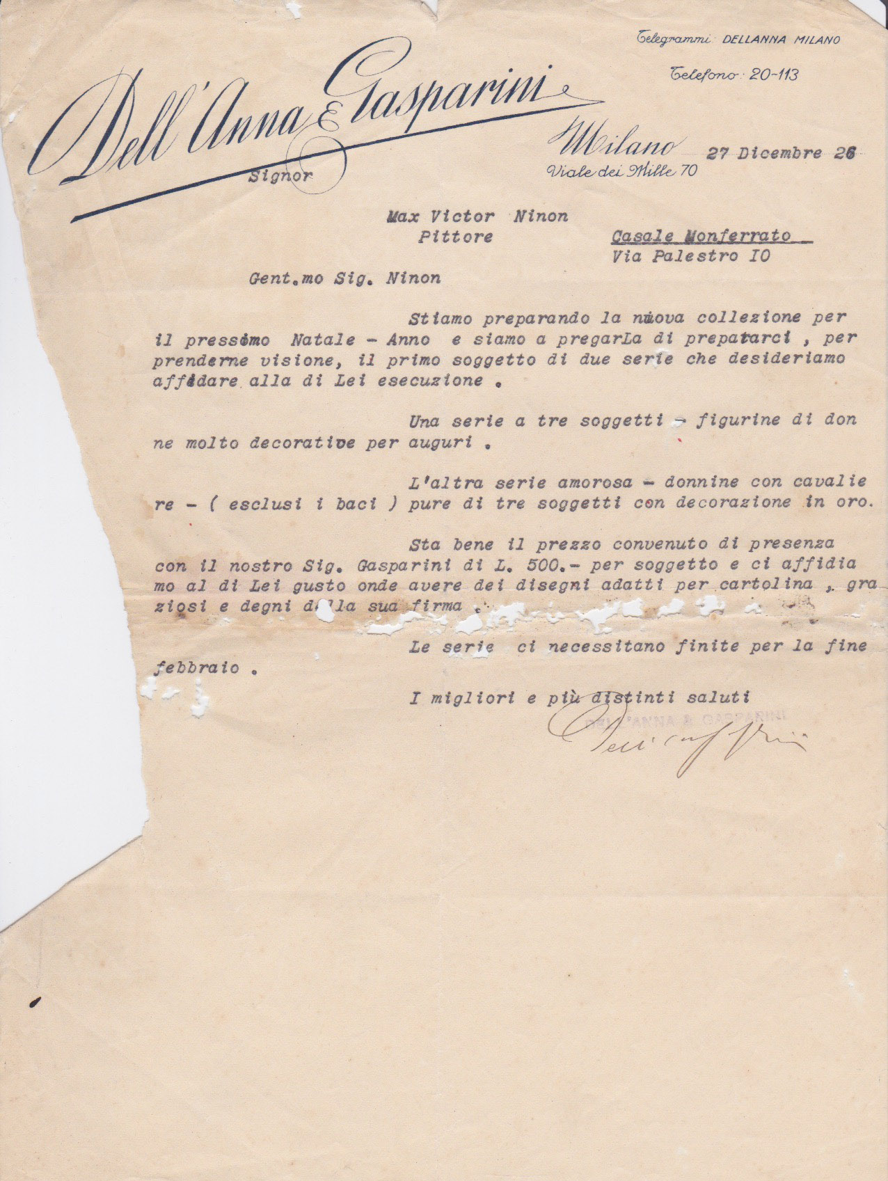 Lettera di incarico della casa editrice Dell'Anna & Gasparini a Vittorio Accornero (Max Ninon) del 27 dicembre 1926